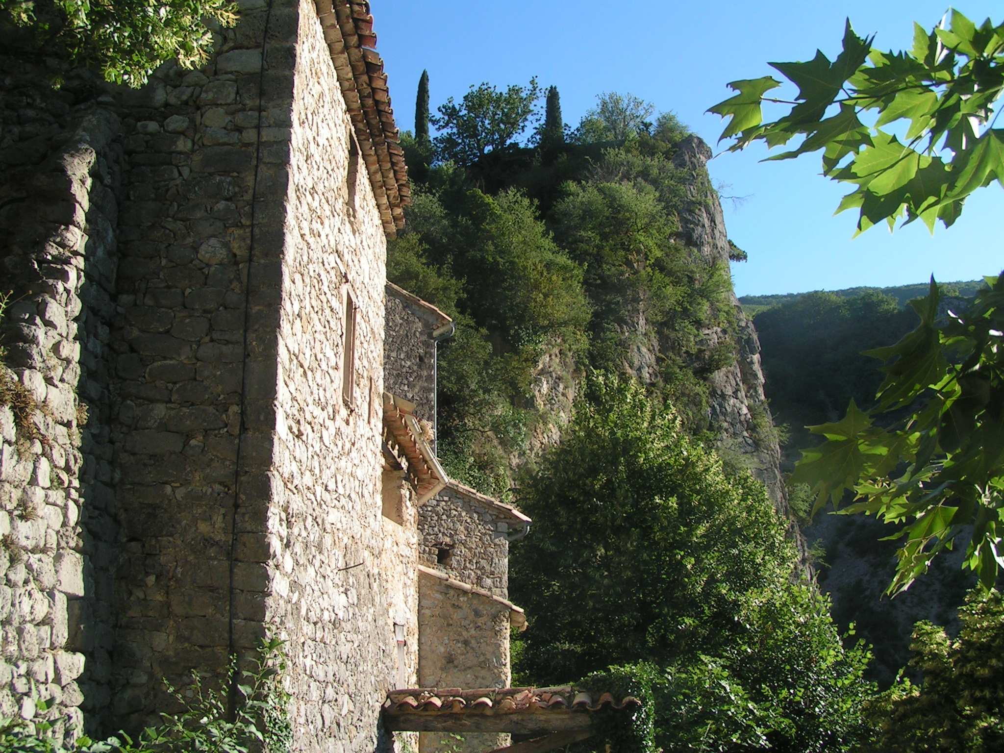 village de Saint-May dans les gorges de l'Eygues (Drôme)